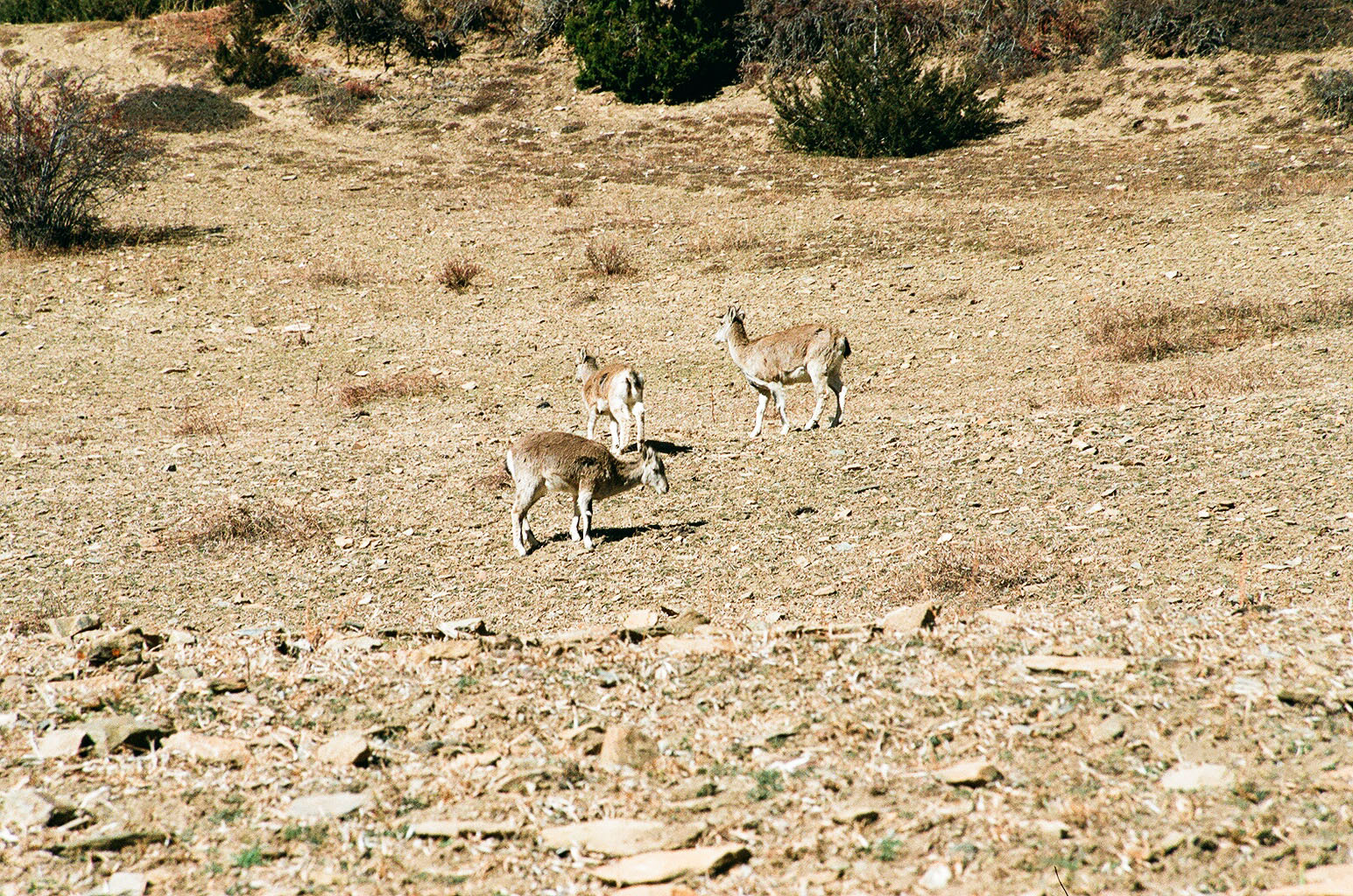 wild lebende Blauschafe in der Annapurna-Region, Himalaya